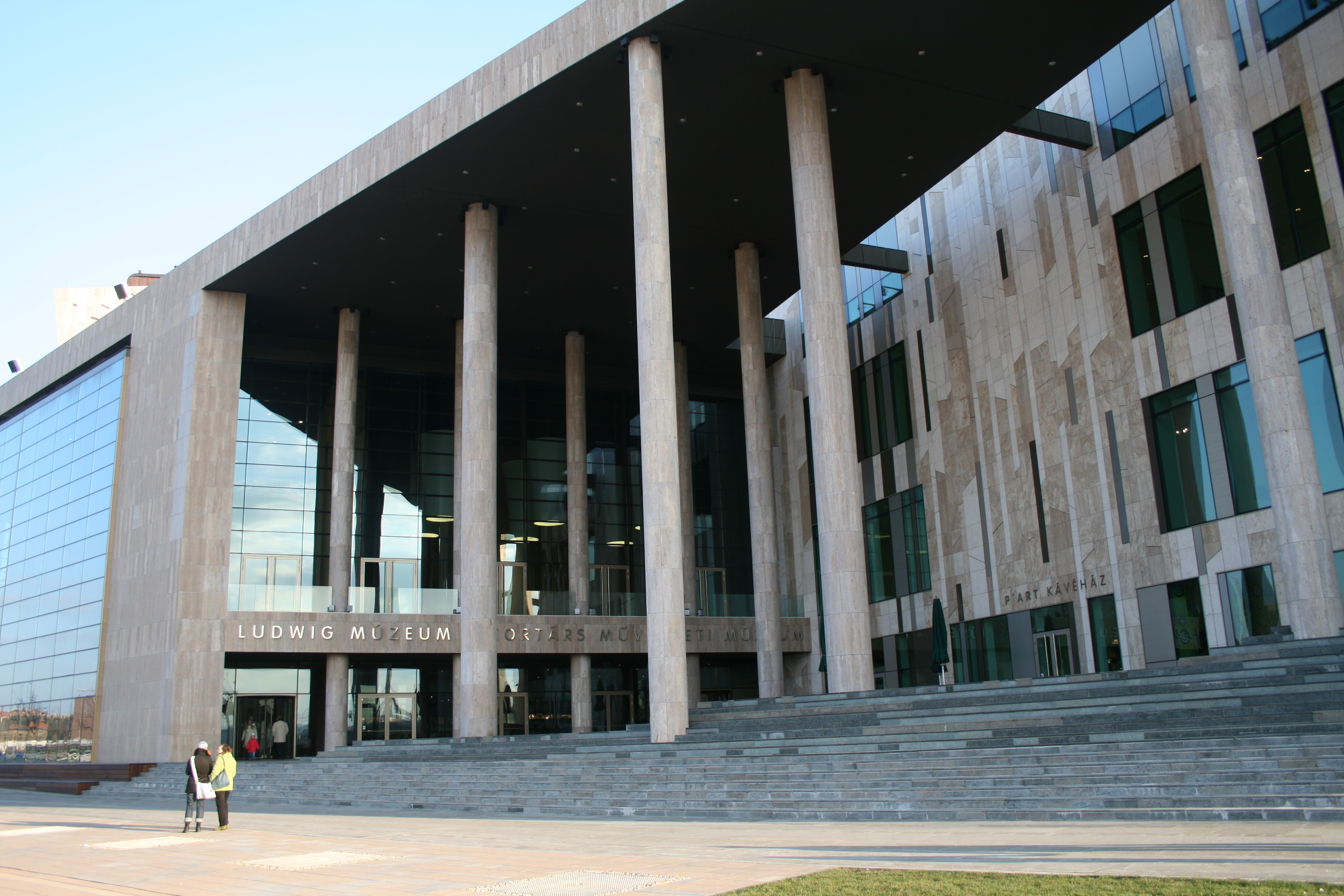 Művészetek Palotája:Museum Ludwig Budapest in Hungary